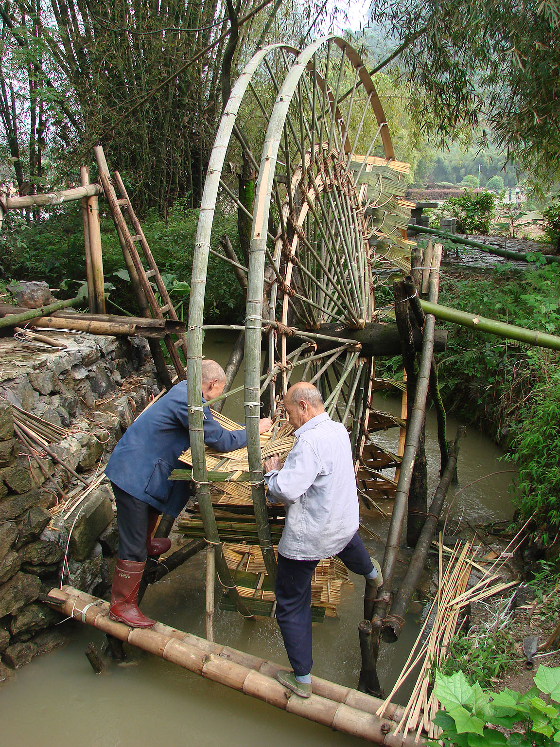 Bambu made mill in China